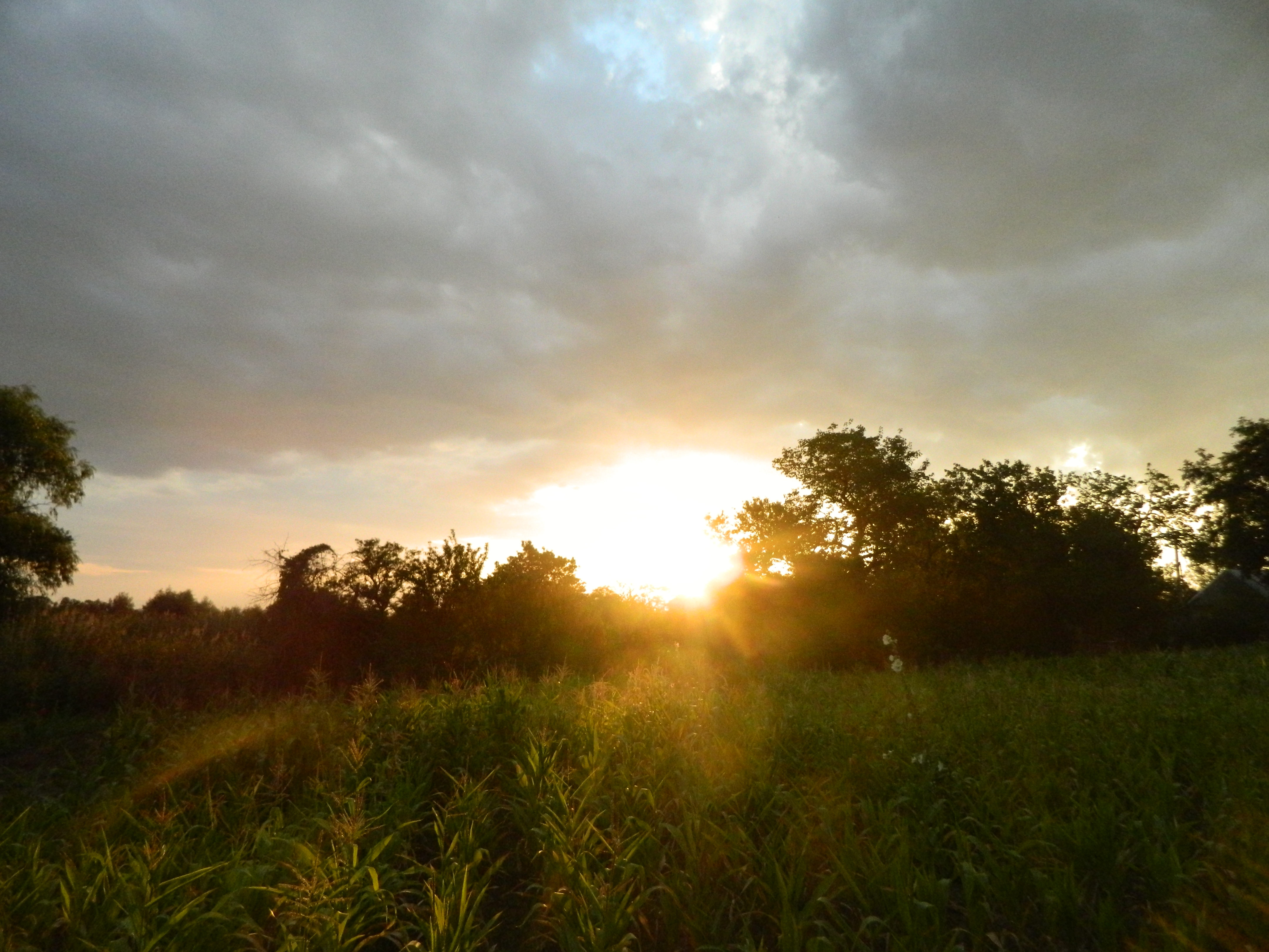 Хороли, Зерноградский район This image is related to the protected area of Russia number 6110032